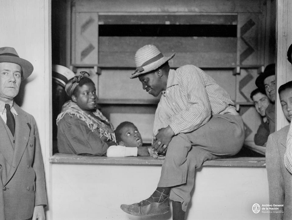 Puesto de empanadas atendido por su dueño, Buenos Aires 1937.